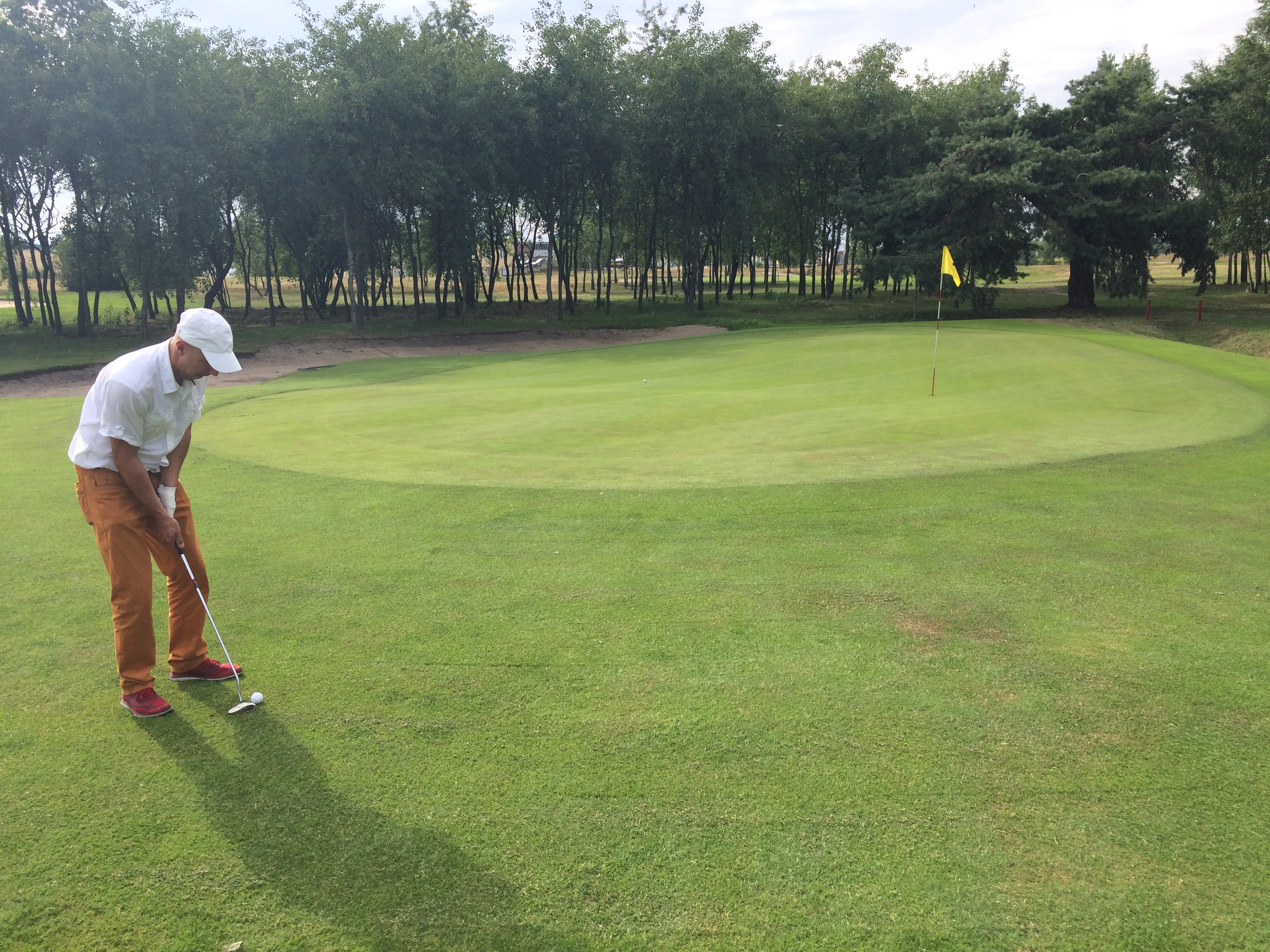 Pole golfowe Toruń